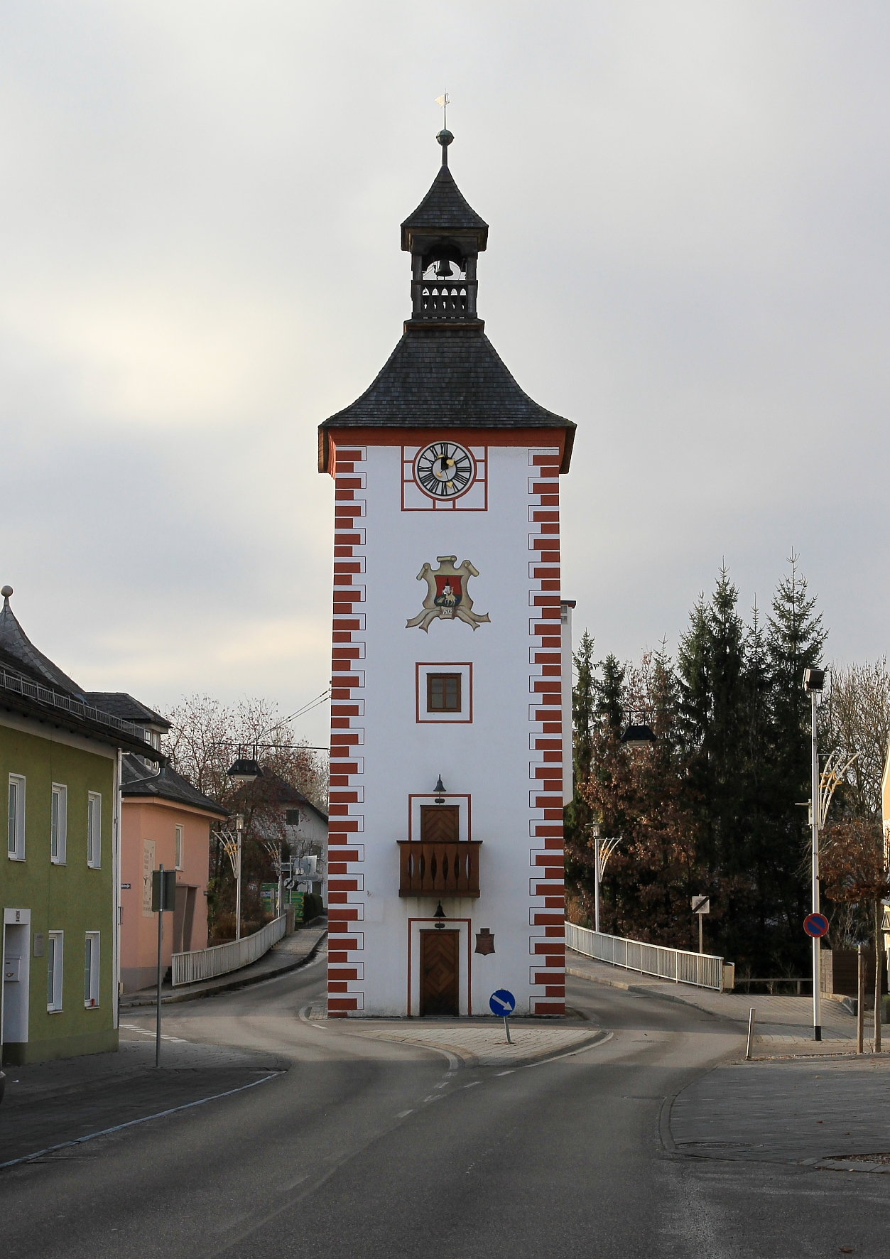 Der denkmalgeschützte Marktturm in der oberösterreichischen Marktgemeinde Timelkam. 1610 errichtet; bis 1842 Sitz des Marktrates und von 1706 bis 1919 als Mautturm in Verwendung.